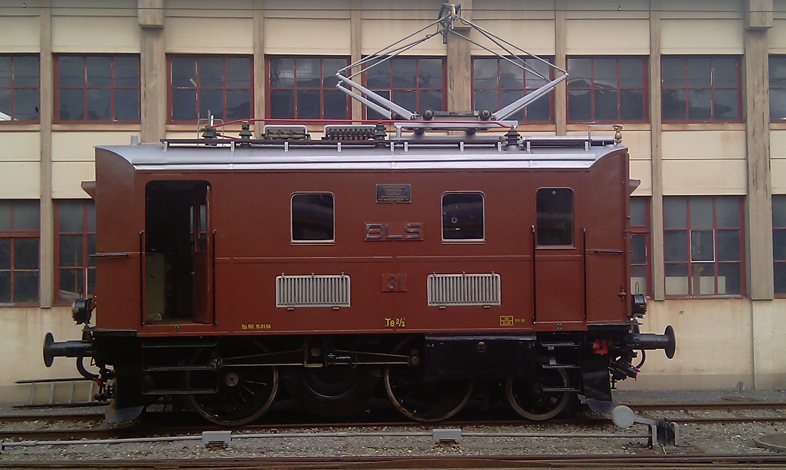 Traktor Te 2/3 31 des Vereins Historische Eisenbahn Emmental, ex BLS CFe 2/6 784, in Huttwil